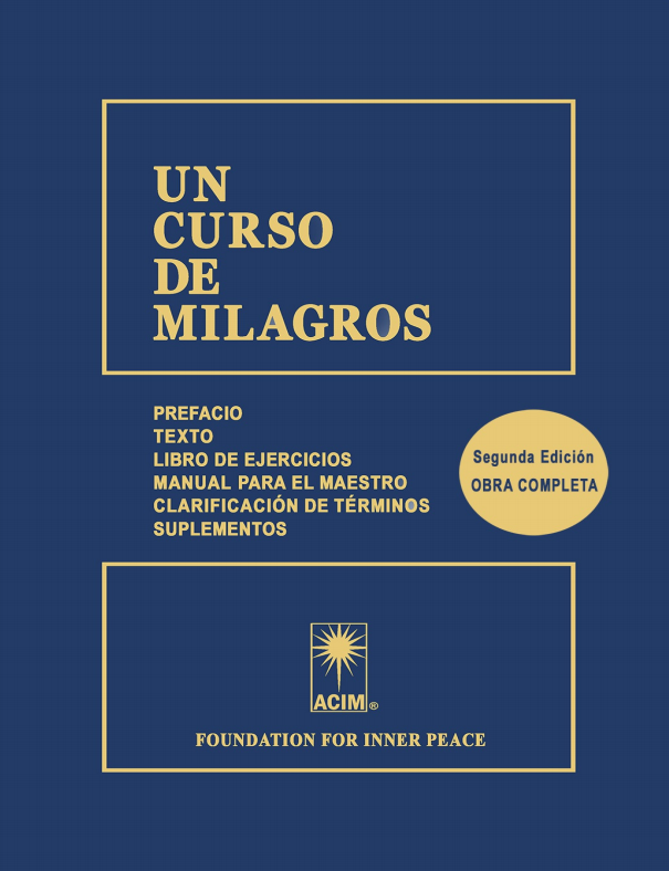 portada del libro UCDM